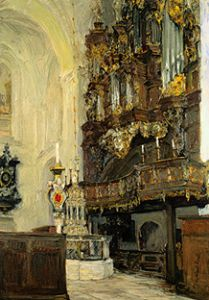 Der Krämerchor mit Orgel im Dom zu Lübeck; 106 x 78 cm, Lübeck, Museum Behnhaus, Inventar-Nr. 518